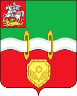 Герб города Наро-Фоминск